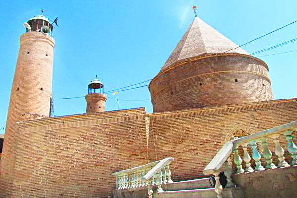 امامزاده ابراهیم لرستان